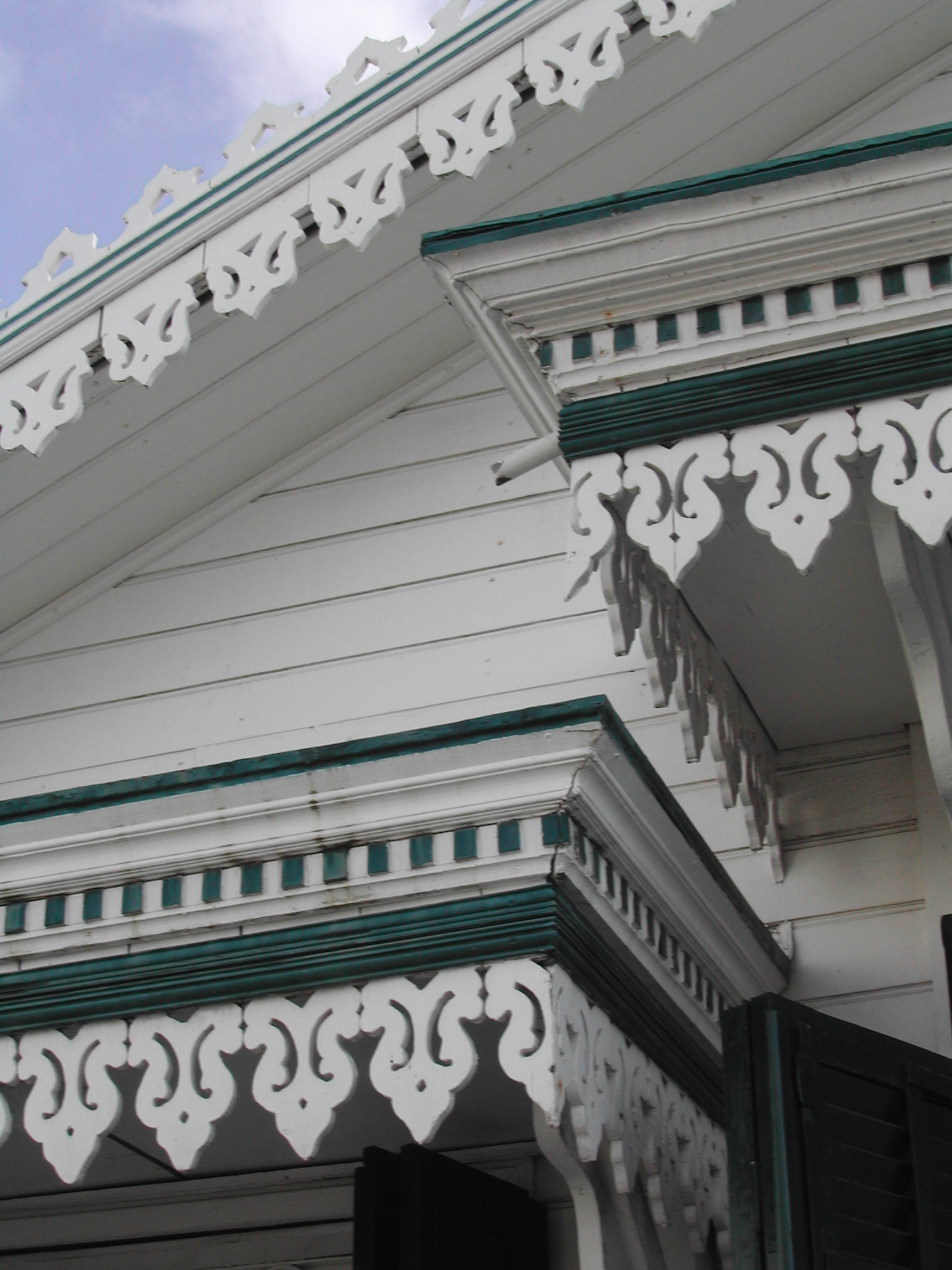 Photo de lambrequins sur une case créole à Saint-Denis de la Réunion.